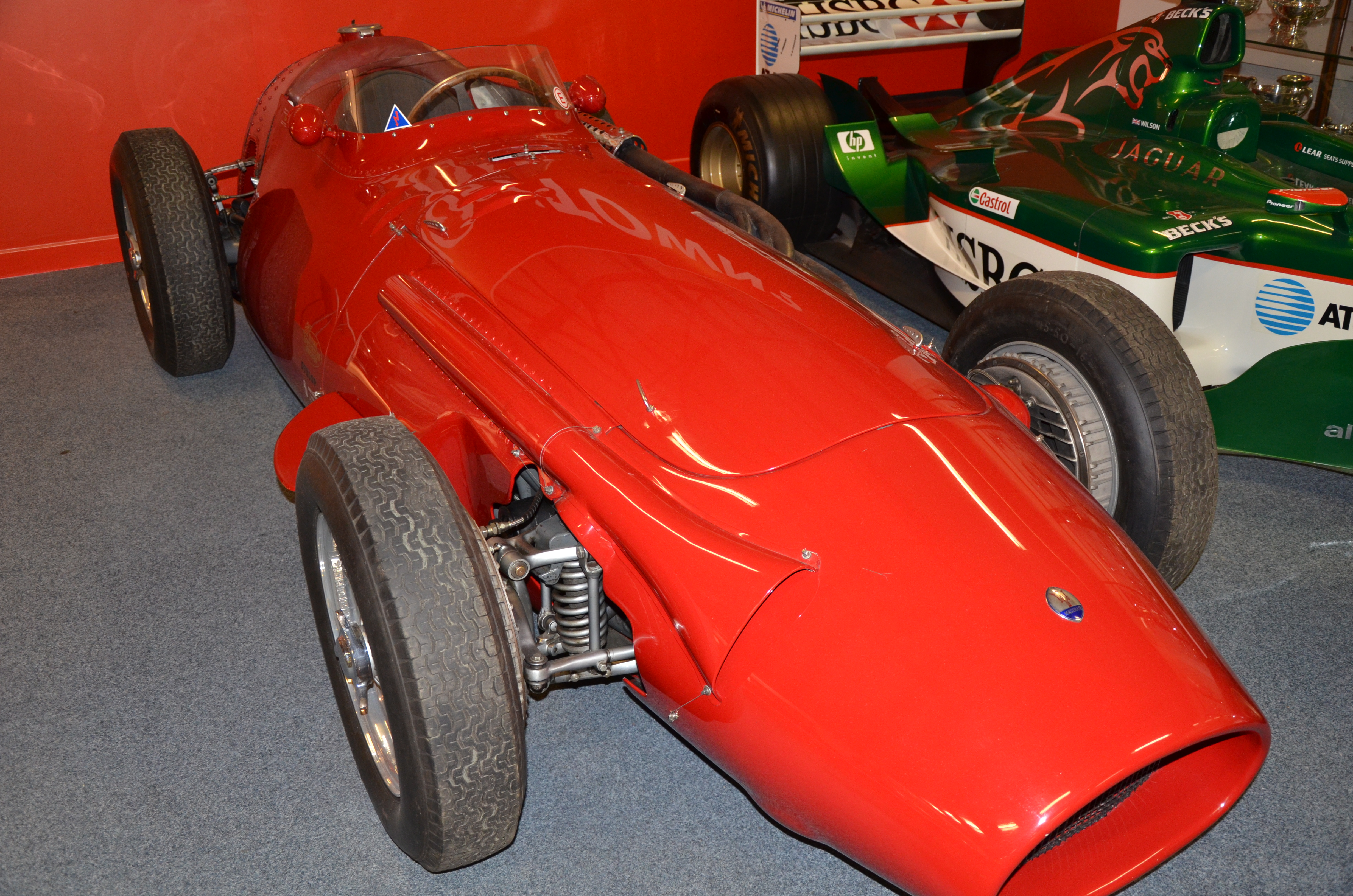 Maserati and Jaguar